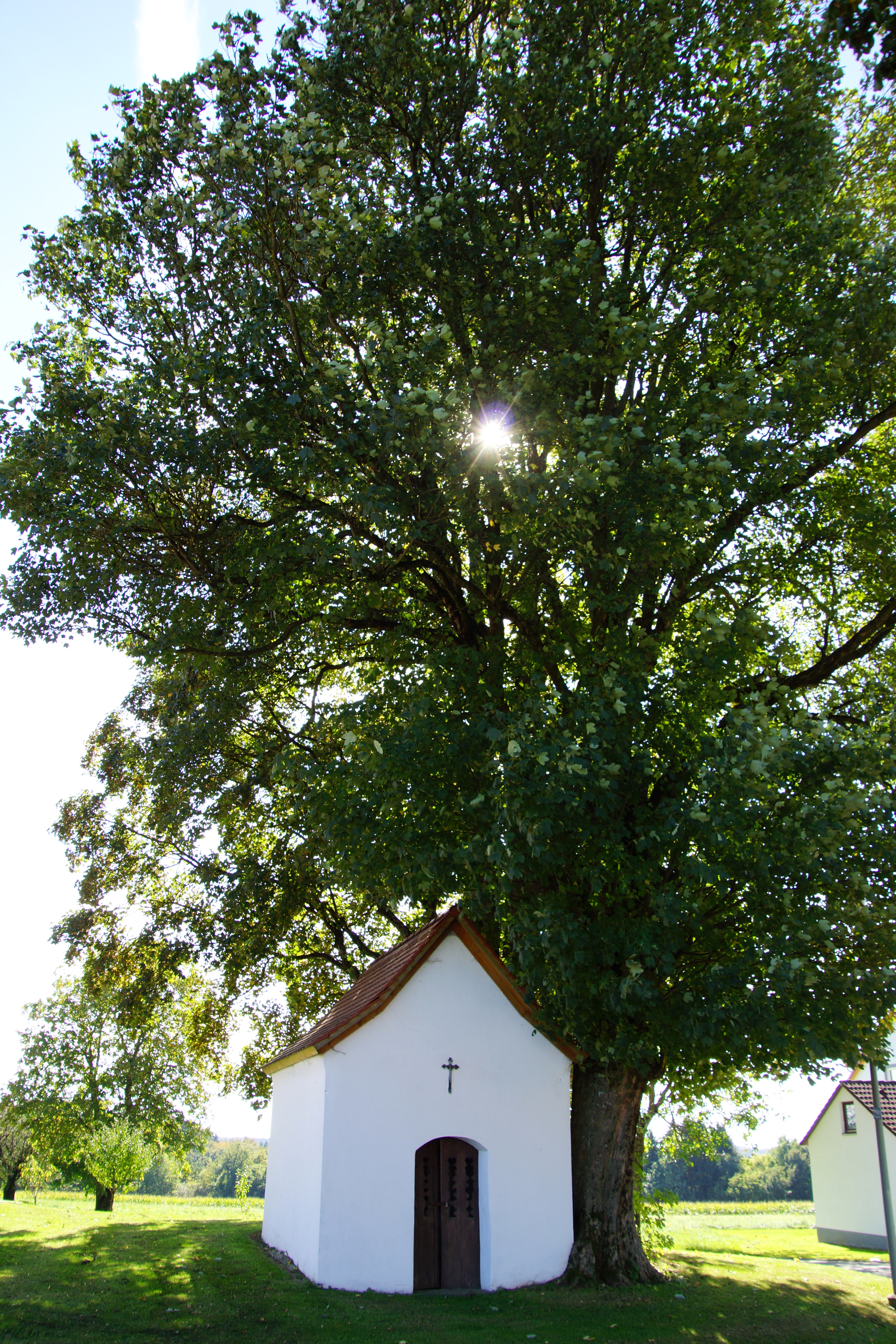 Die Marienkapelle in Bischberg bei Sindelbach